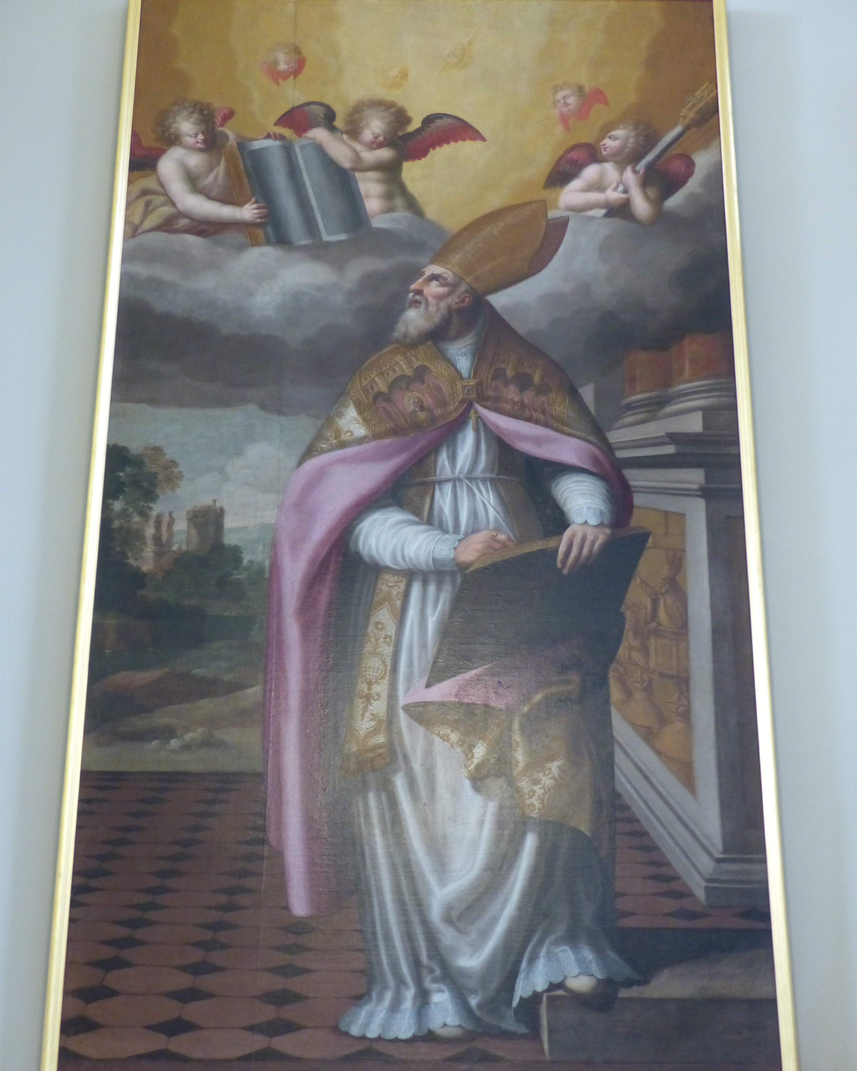 Nice (Alpes-Maritimes, France), cathédrale Ste Réparate, chapelle dite des évêques, ajoutée en 1900 en position d'absidiole méridionale; portrait en pied de Valérien de Cimiez, évêque de Cemenelum (Cimiez à Nice).